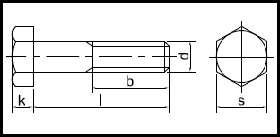 DIN 6914